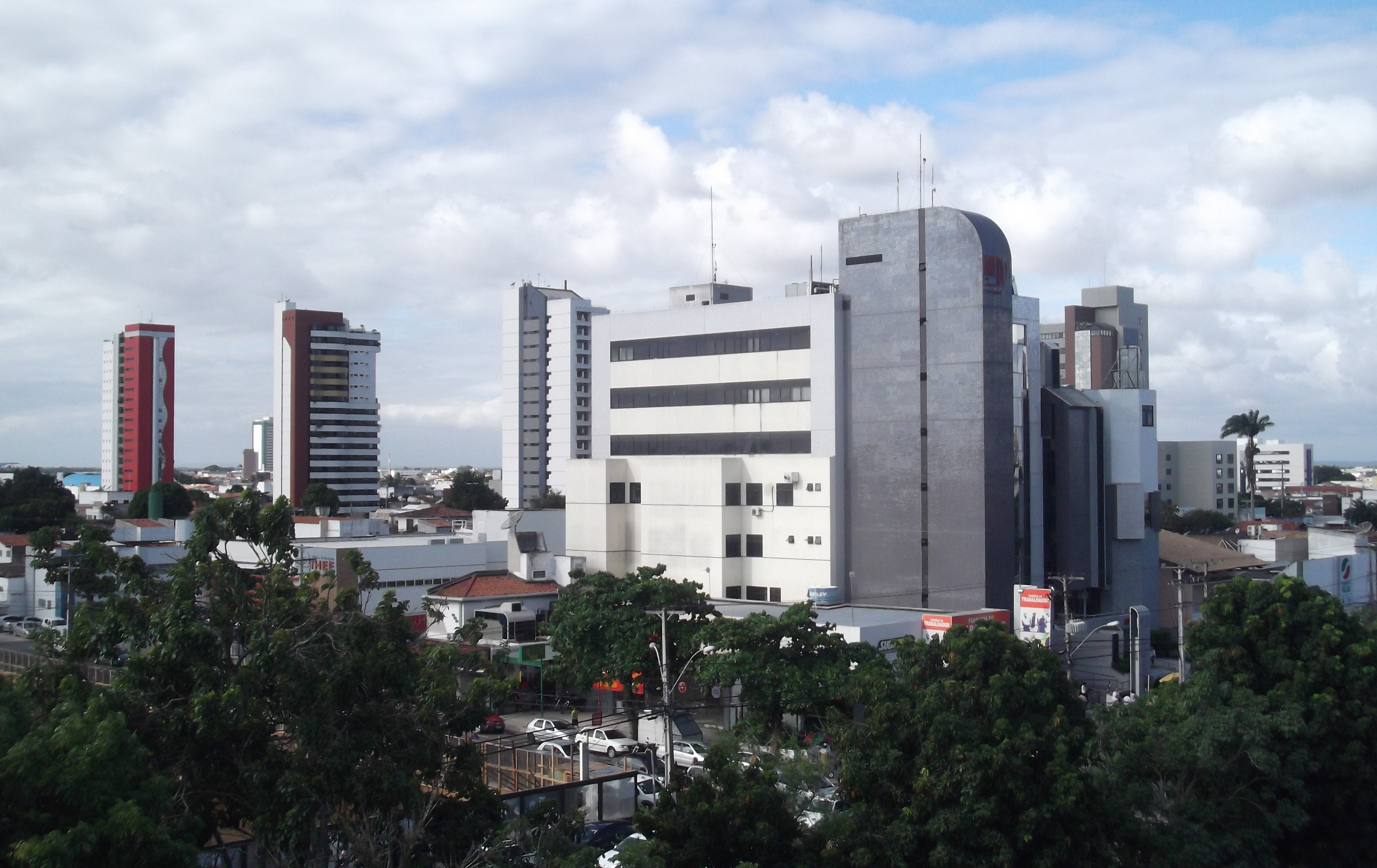 prédios no bairro Kalilândia em Feira de Santana